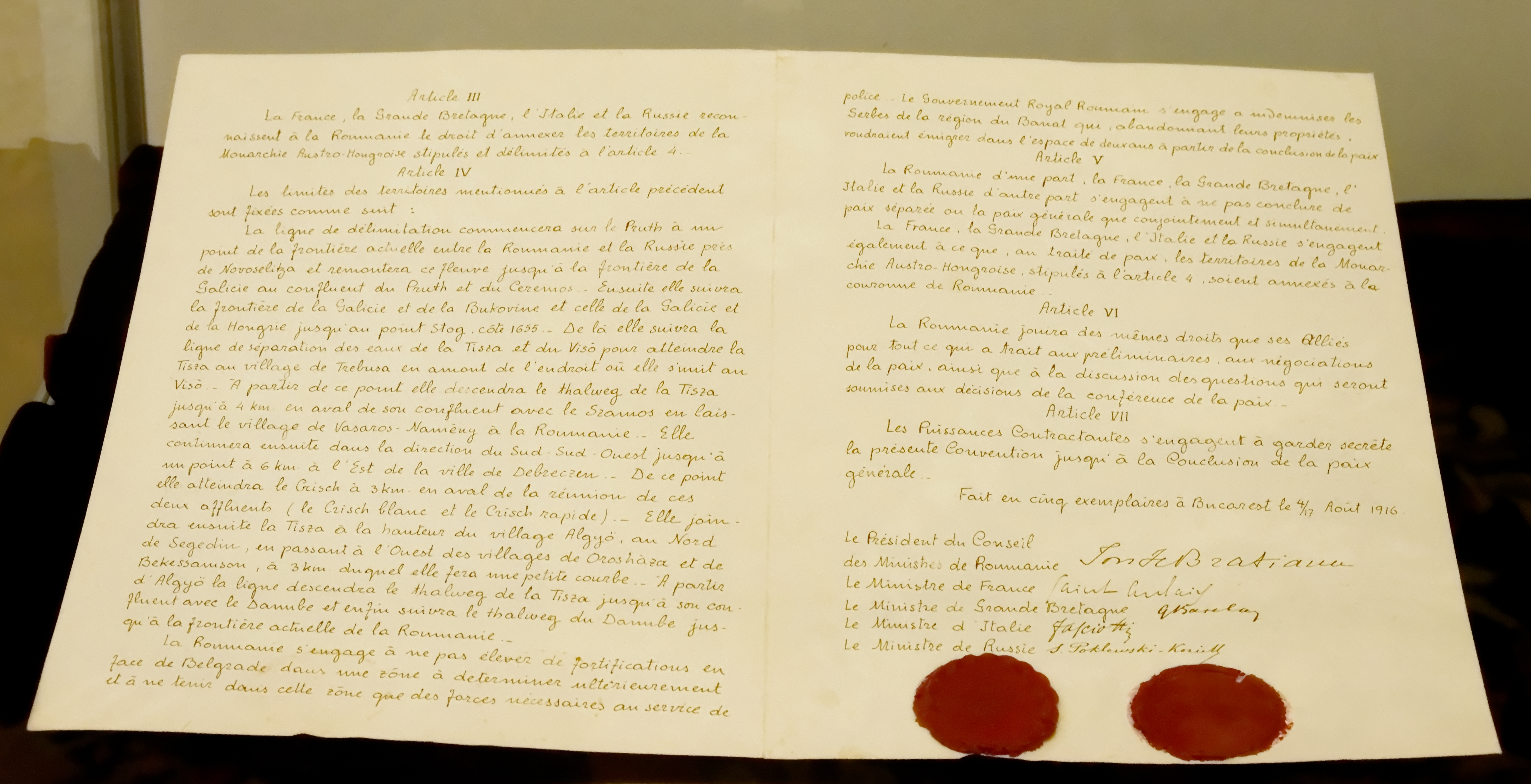 Traité d'alliance entre la Roumanie, la France, la Grande Bretagne, l'Italie et la Russie du 4/17 août 1916